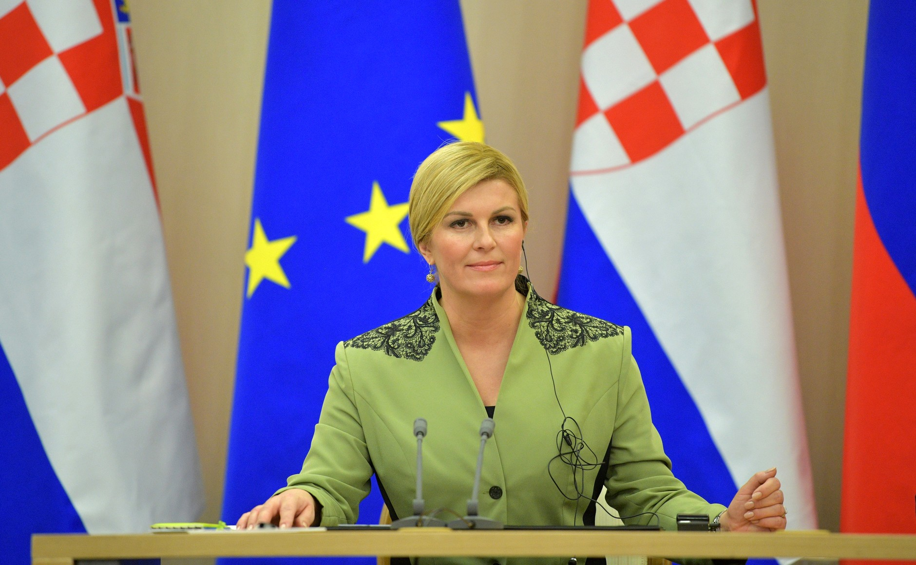 Заявления для прессы по итогам российско-хорватских переговоров. Президент Республики Хорватии Колинда Грабар-Китарович